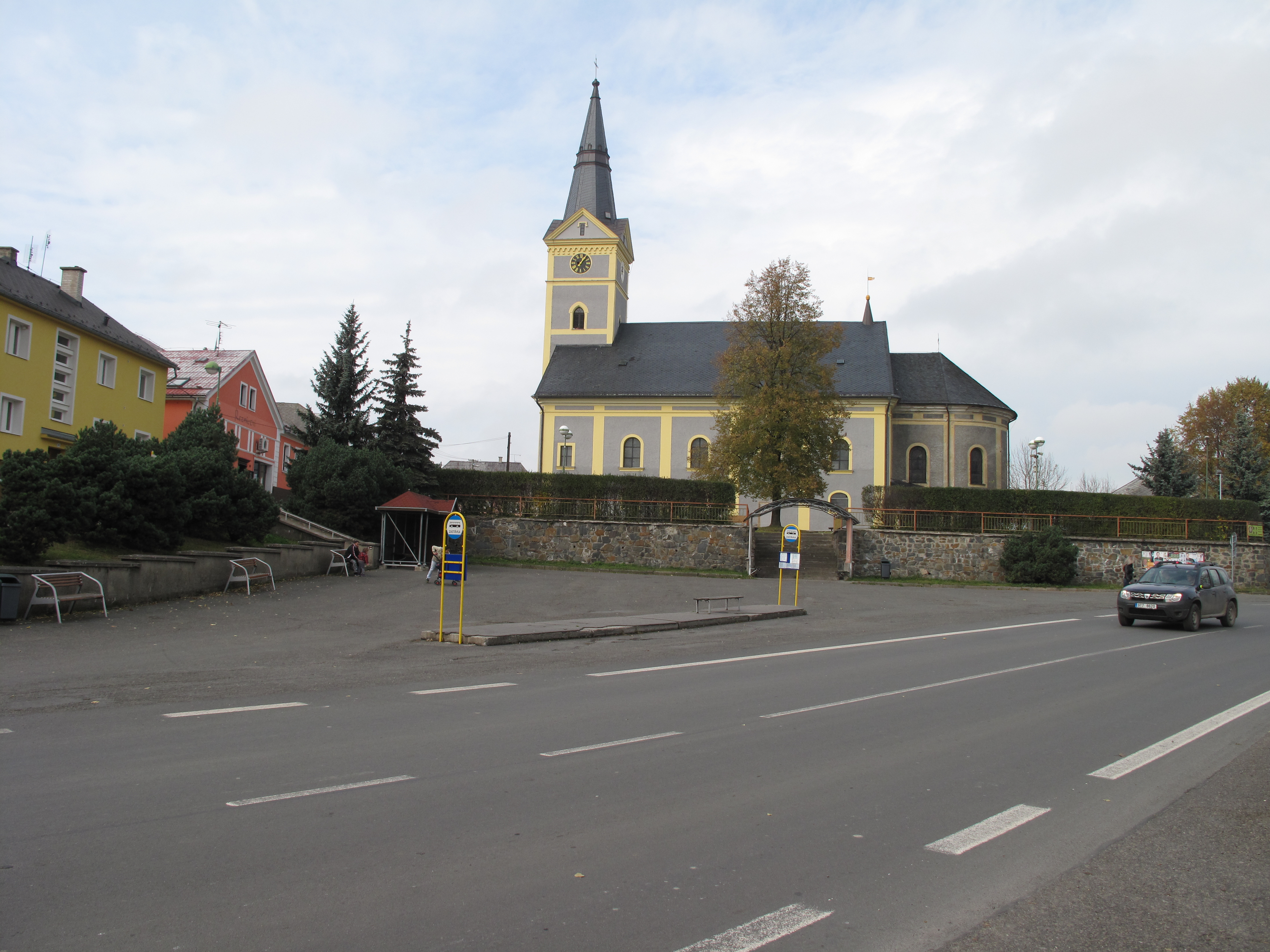 Dvorce (okres Bruntál). Okres Bruntál, Česká republika.